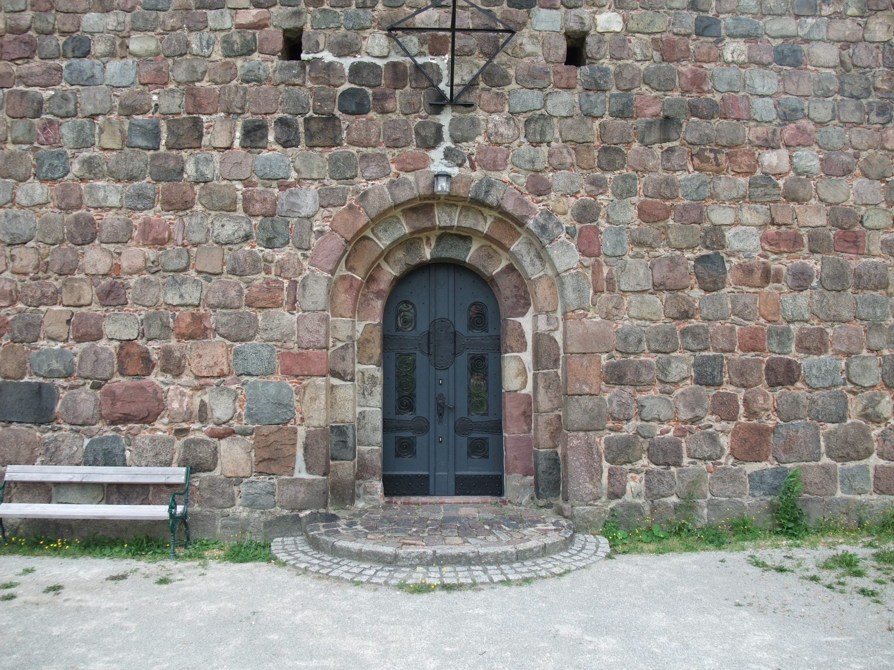 Eingangstür der Kirche in Lindenberg (Barnim), Deutschland.